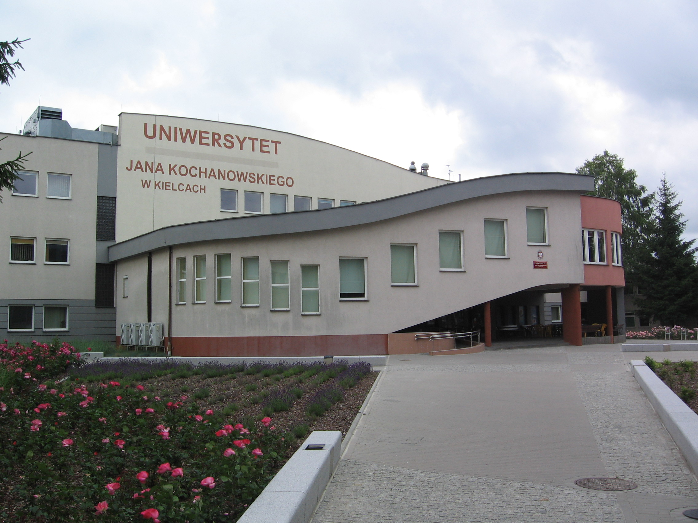 Wydział Zarządzania i Administracji UJK w Kielcach, który powstał w 1992 roku.